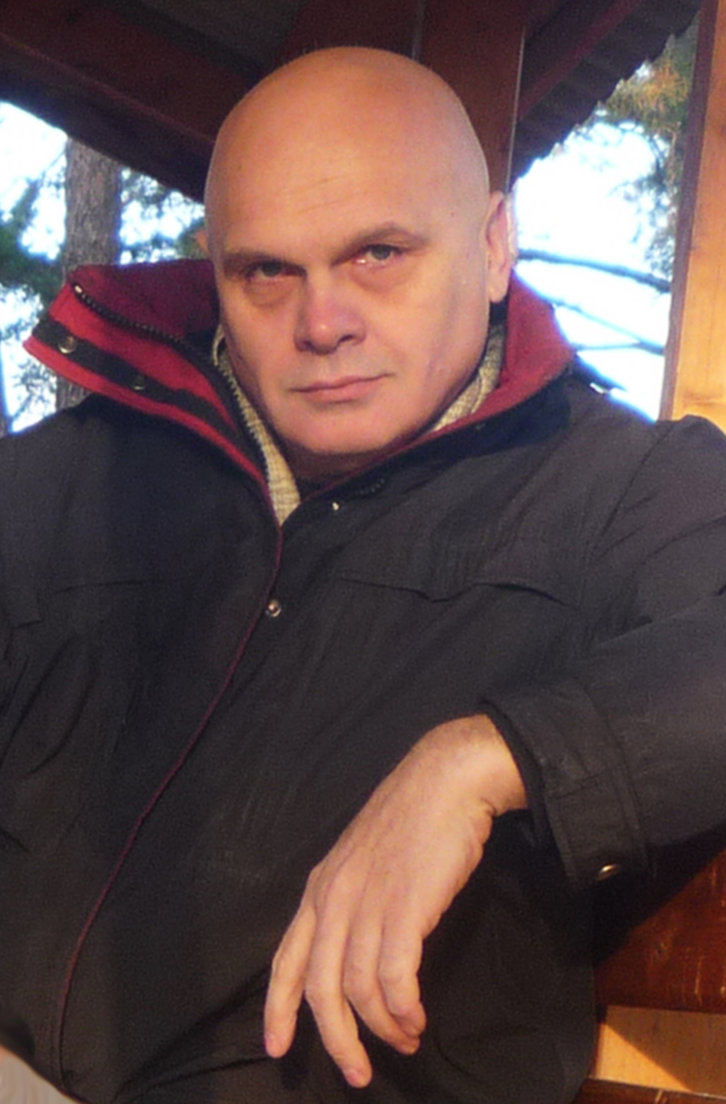 Павел Морозов, драматург